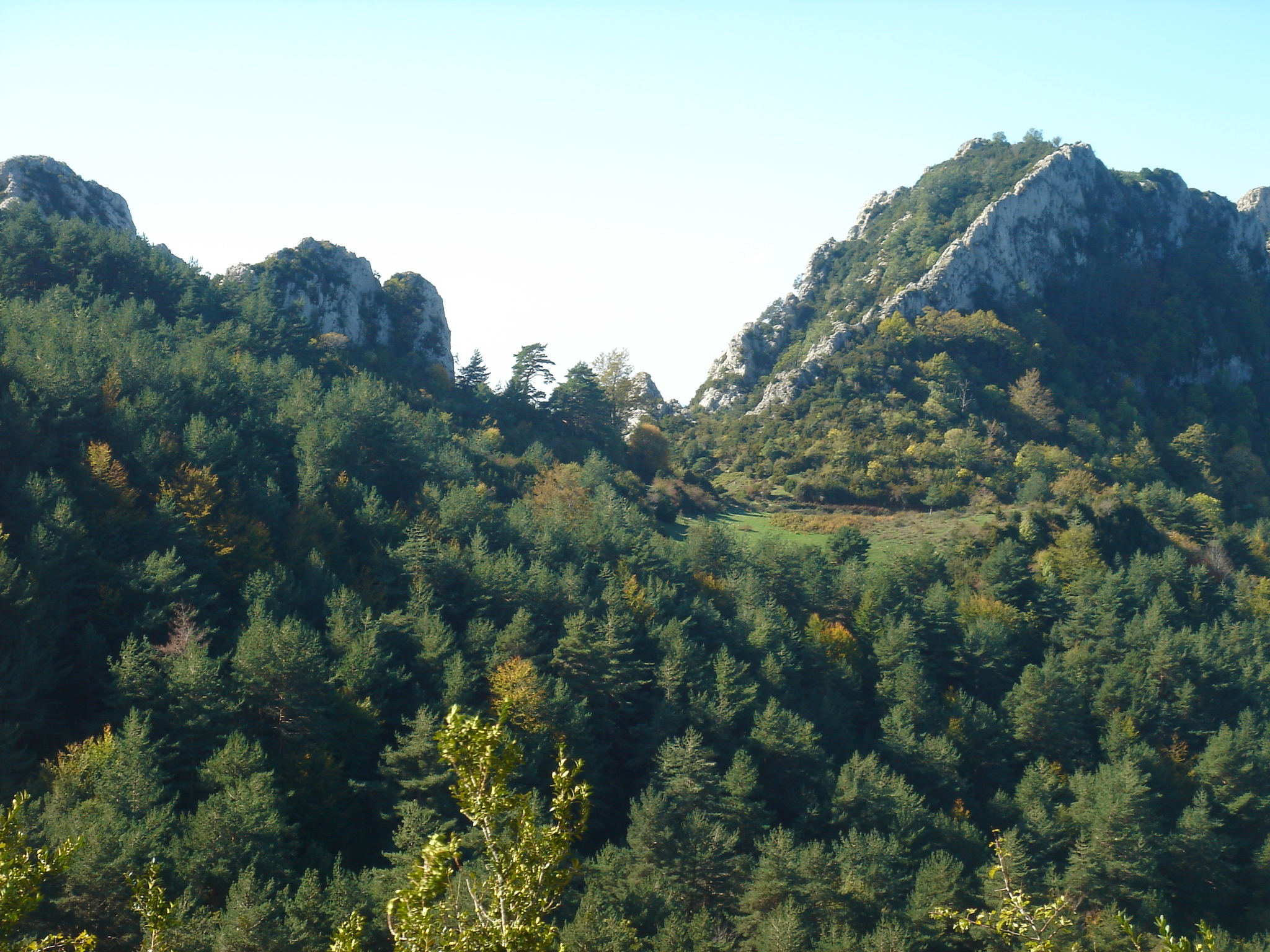 Paso montañoso, llamado del Portillo, de la Sierra de Santo Domingo, en el término municipal de Longás